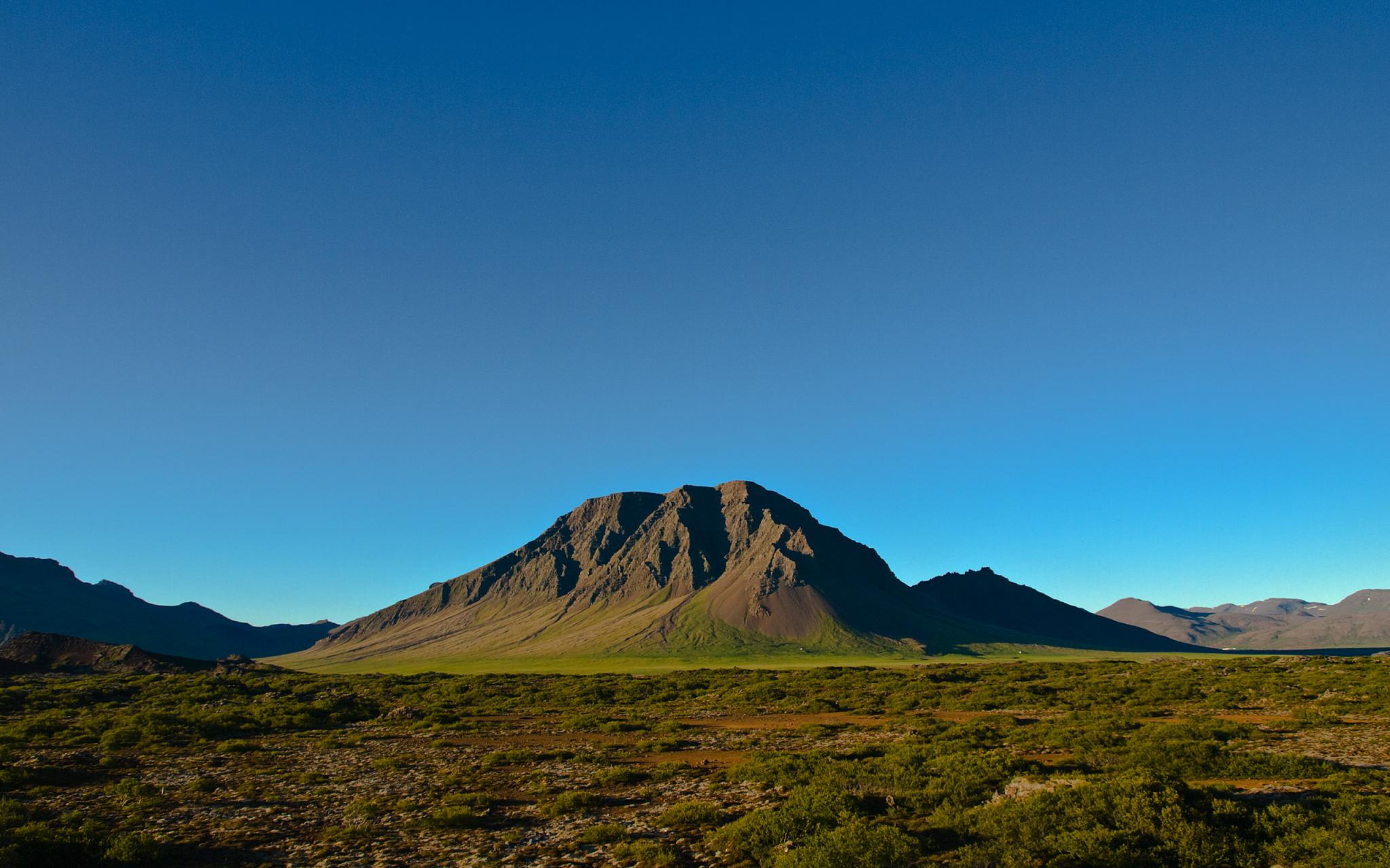 Fagraskógarfjall